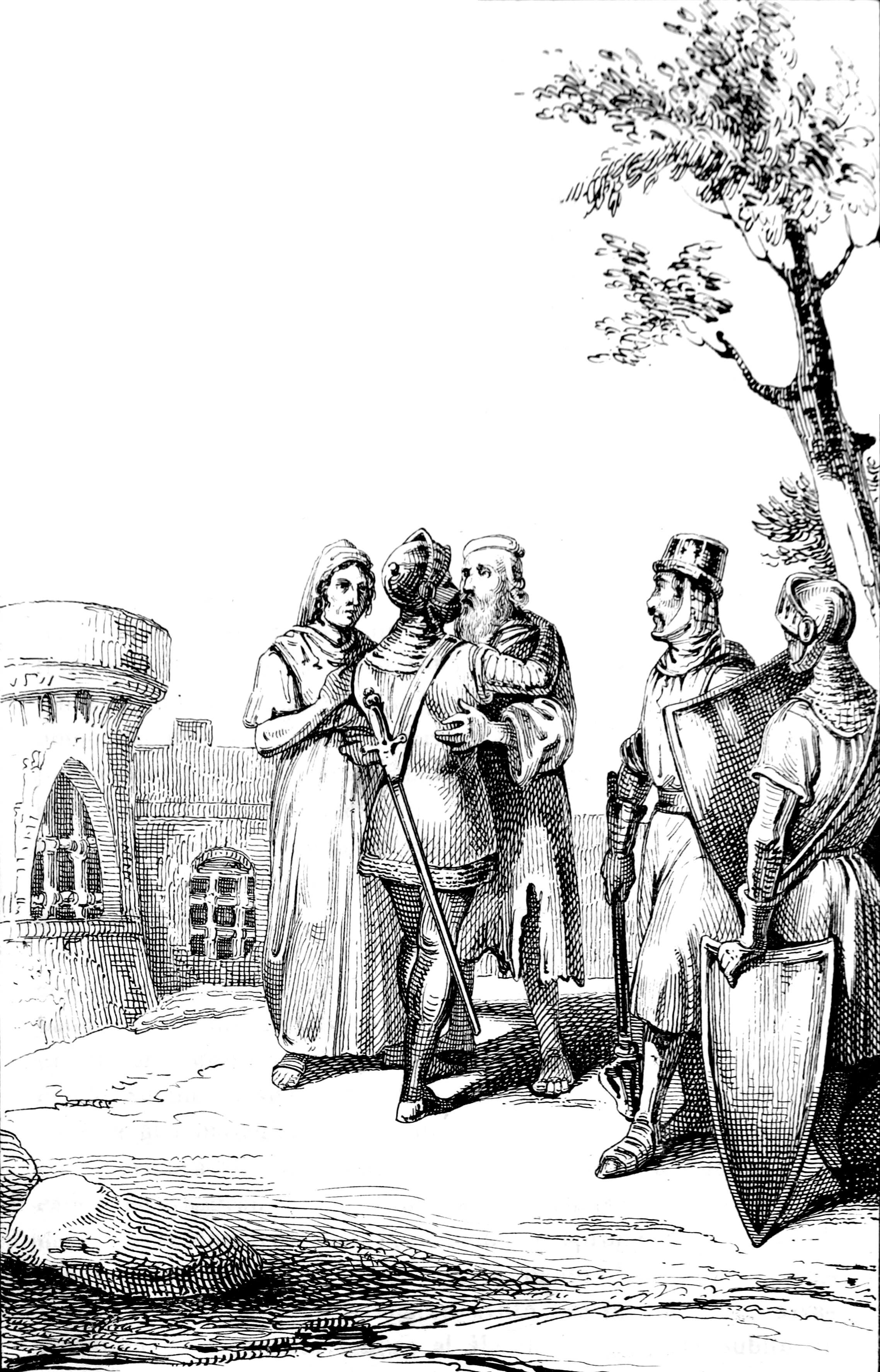 Illustrazione da Guerino detto il Meschino, di Andrea da Barberino, Milano, Tip. Guglielmini e Radaelli, 1841.